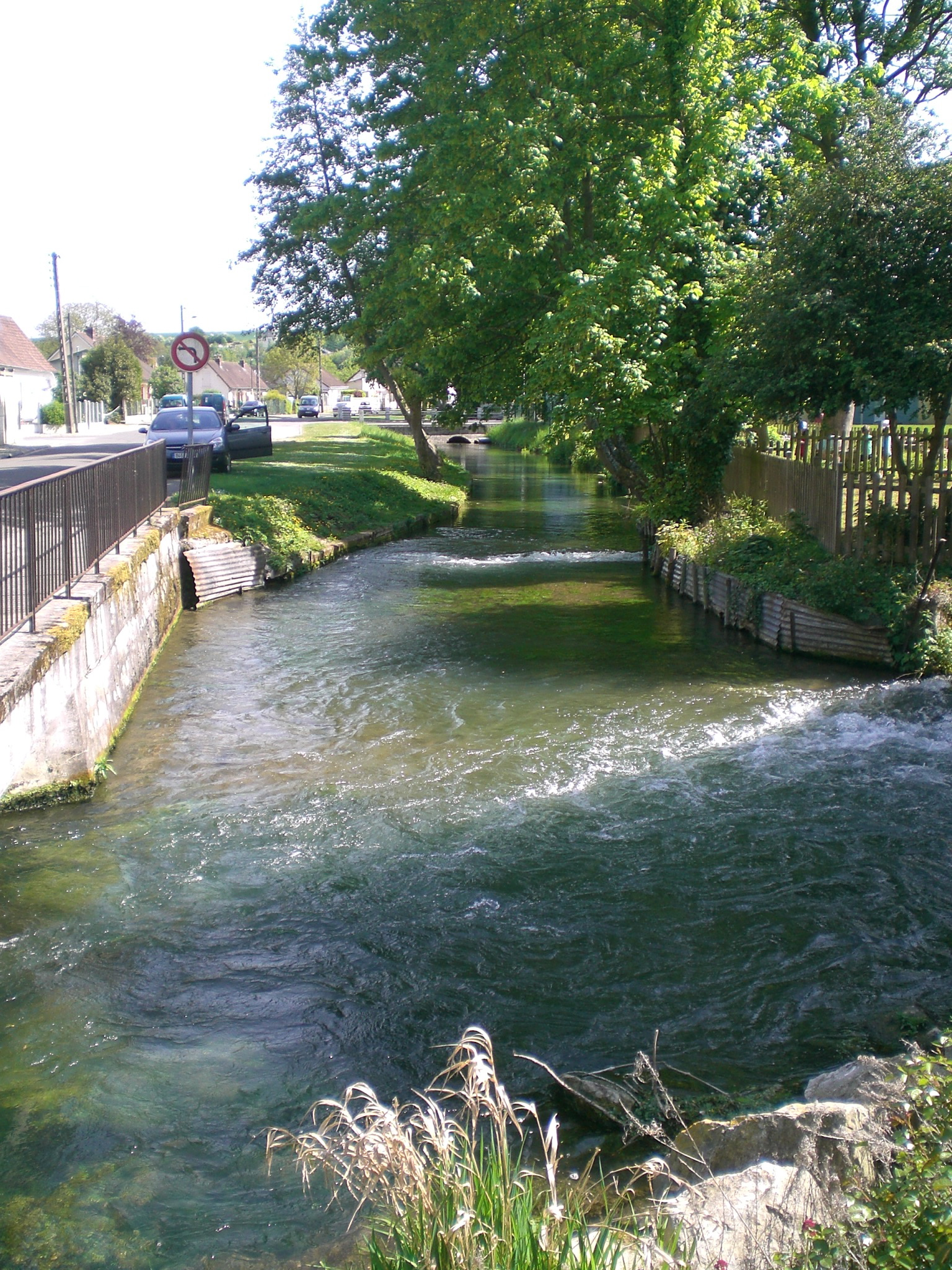 l'Airaines à Longpré-les-Corps-Saints en mai 2010